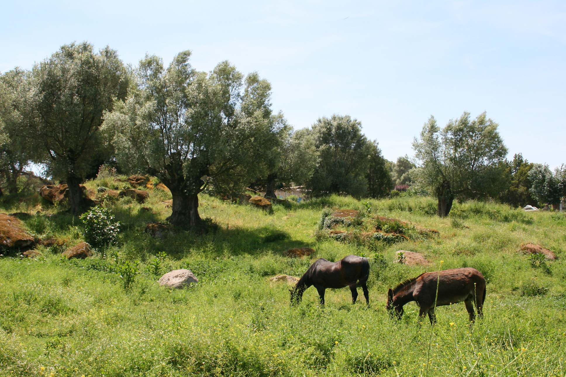 Filitosa France (Corse-du-Sud), âne et cheval paissant aux pieds de vieux oliviers à l'entrée du site.